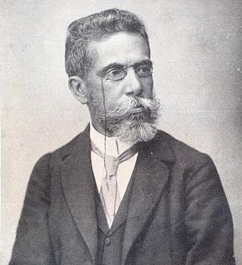 Machado de Assis at 57